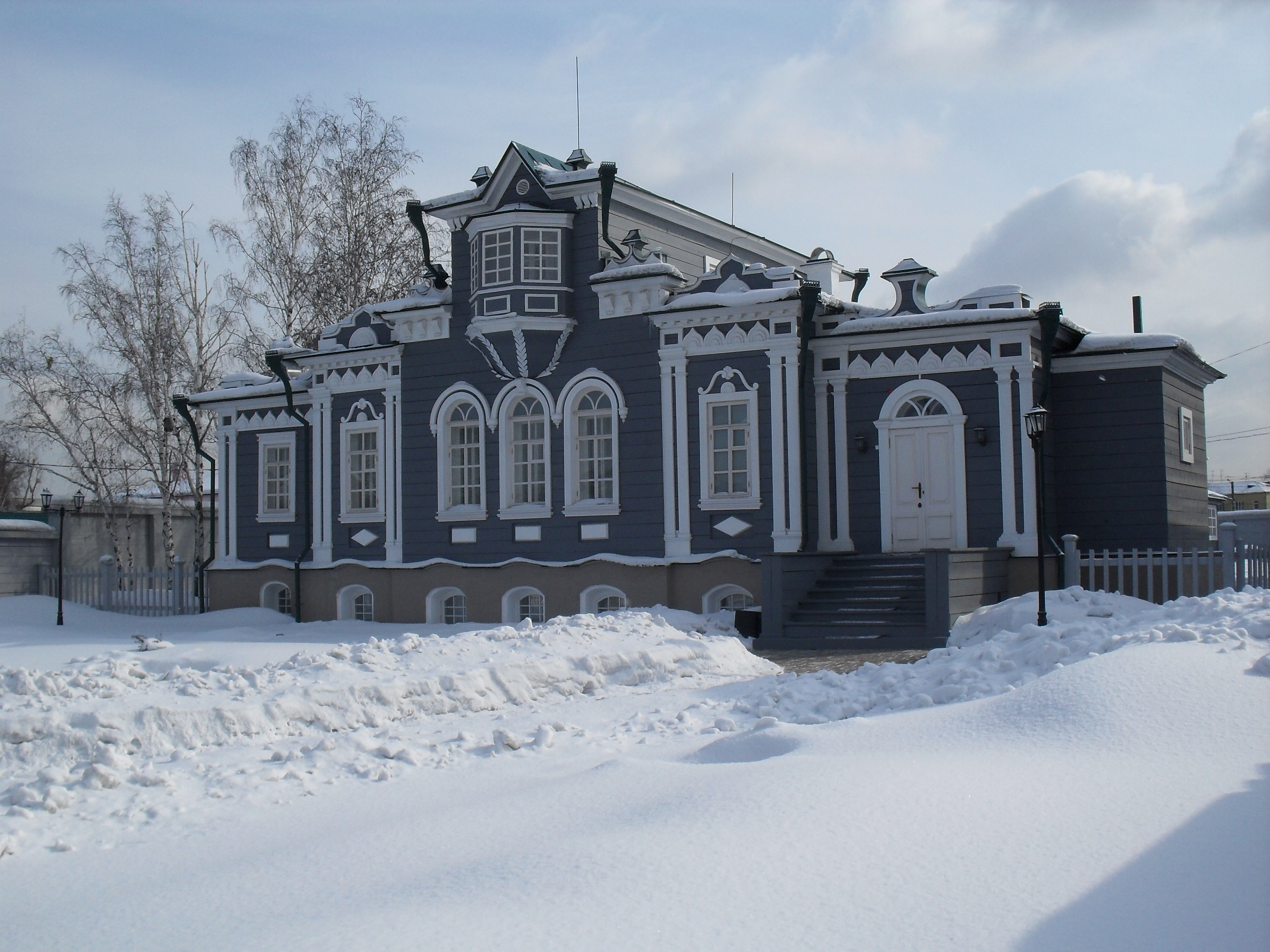 Иркутск. Иркутск. Дом князя С. П. Трубецкого (1854). С 1970 - музей декабристов.